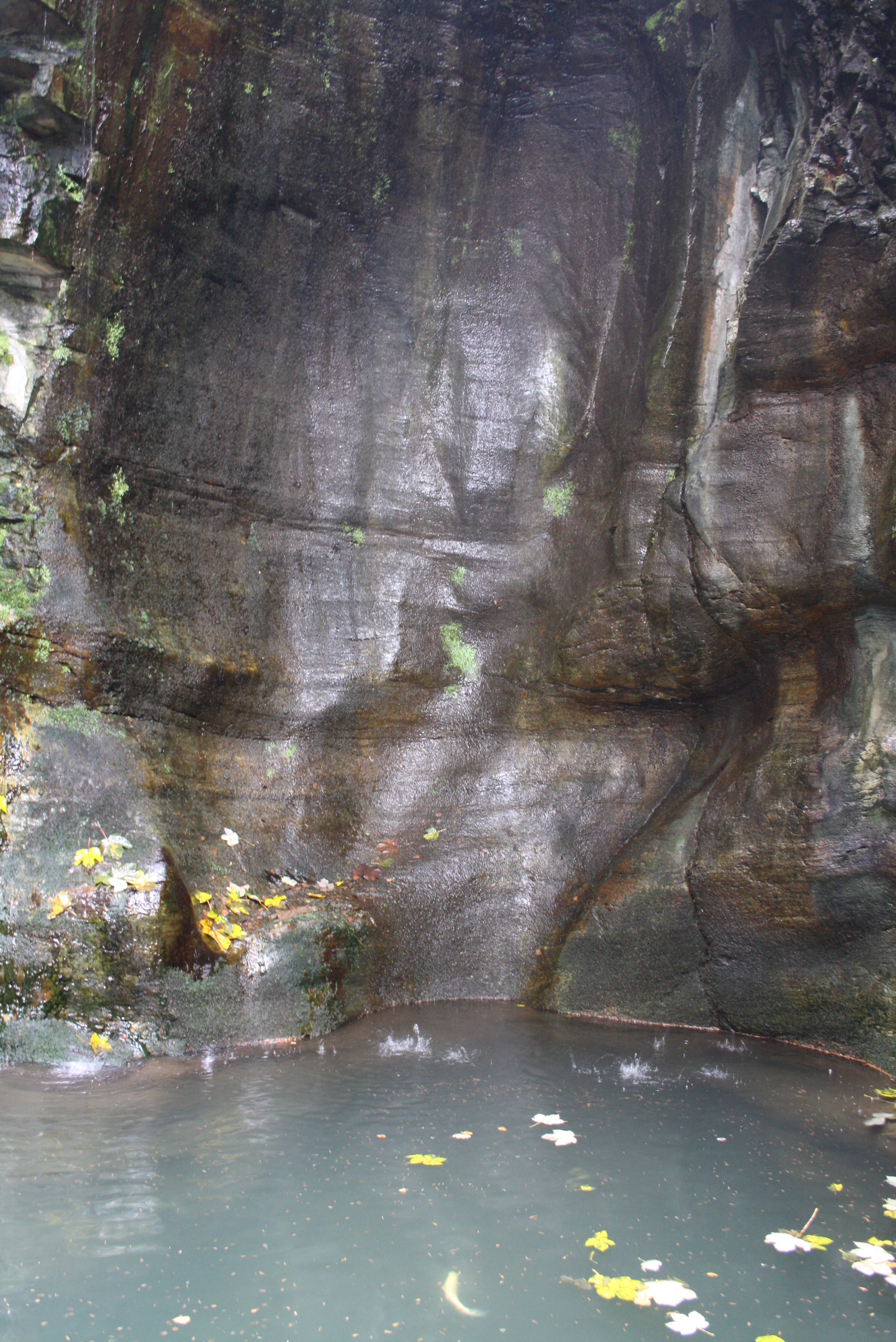 Naturdenkmal Gletschermühle in Bad Gastein. Dort direkt in der Einfahrt des Parkhauses. This media shows the natural monument in Salzburg with the ID NDM00195.